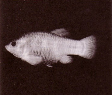 Extinct Tecopa pupfish (Cyprinodon nevadensis calidae).